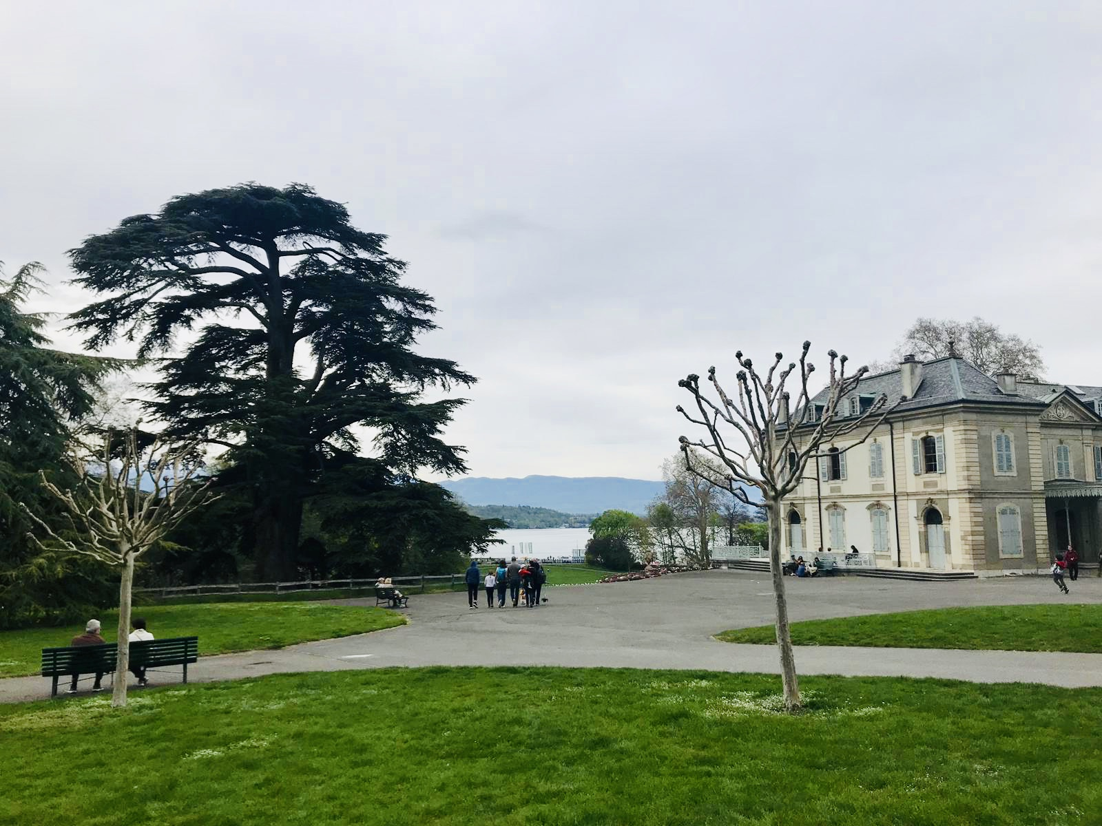 La Villa La Grange et ses alentours avec une vue sur le Léman